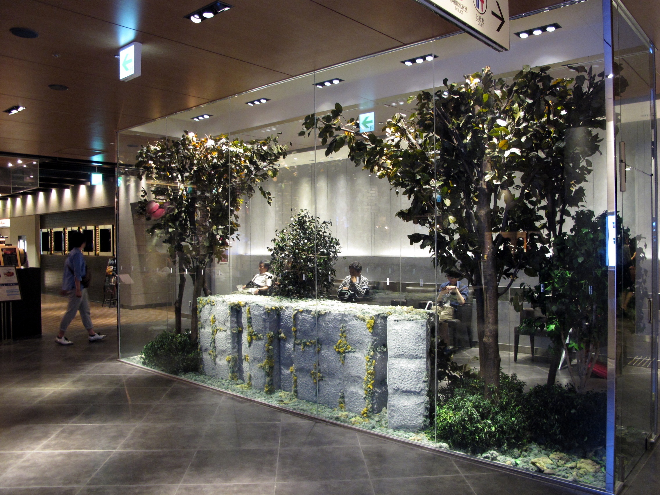 JR Osaka Station ISETAN Level 10 Eat Paradise